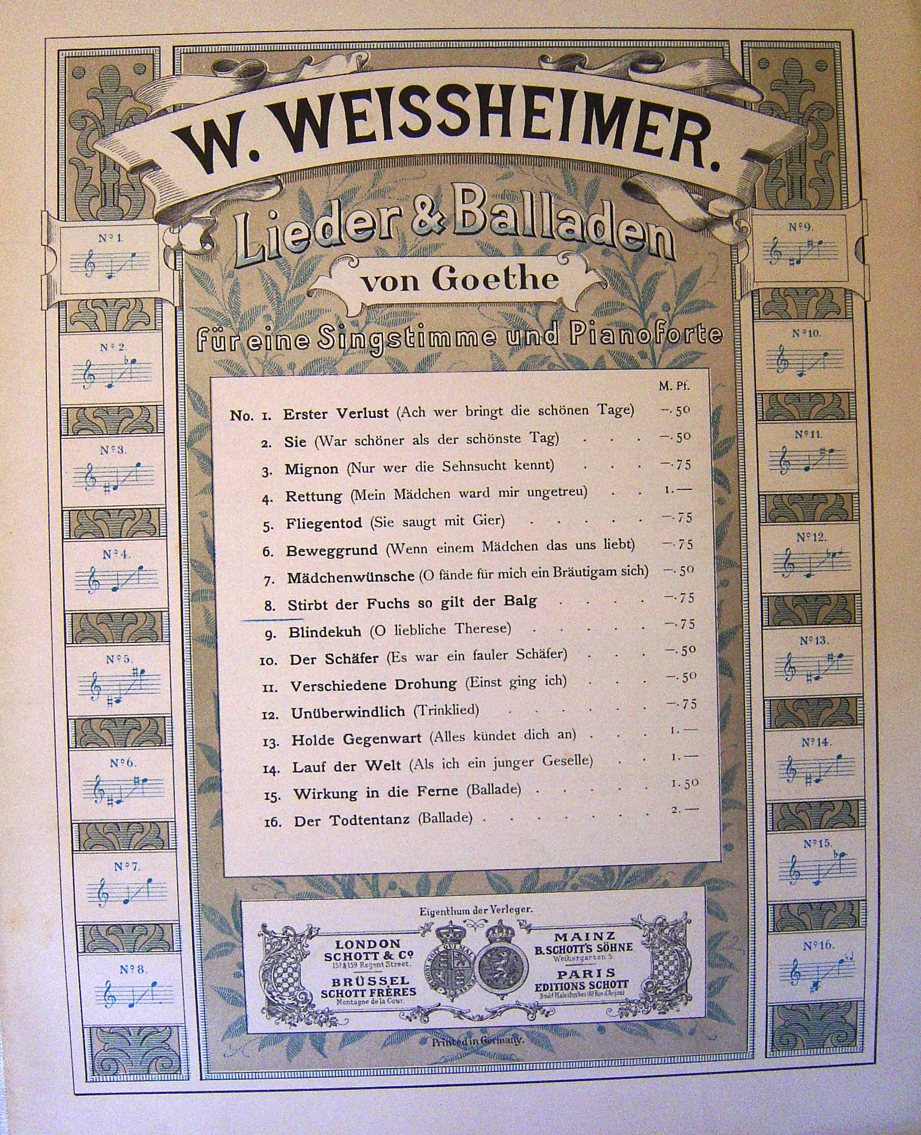 Wendelin Weißheimer,Lieder und Ballade von Goethe